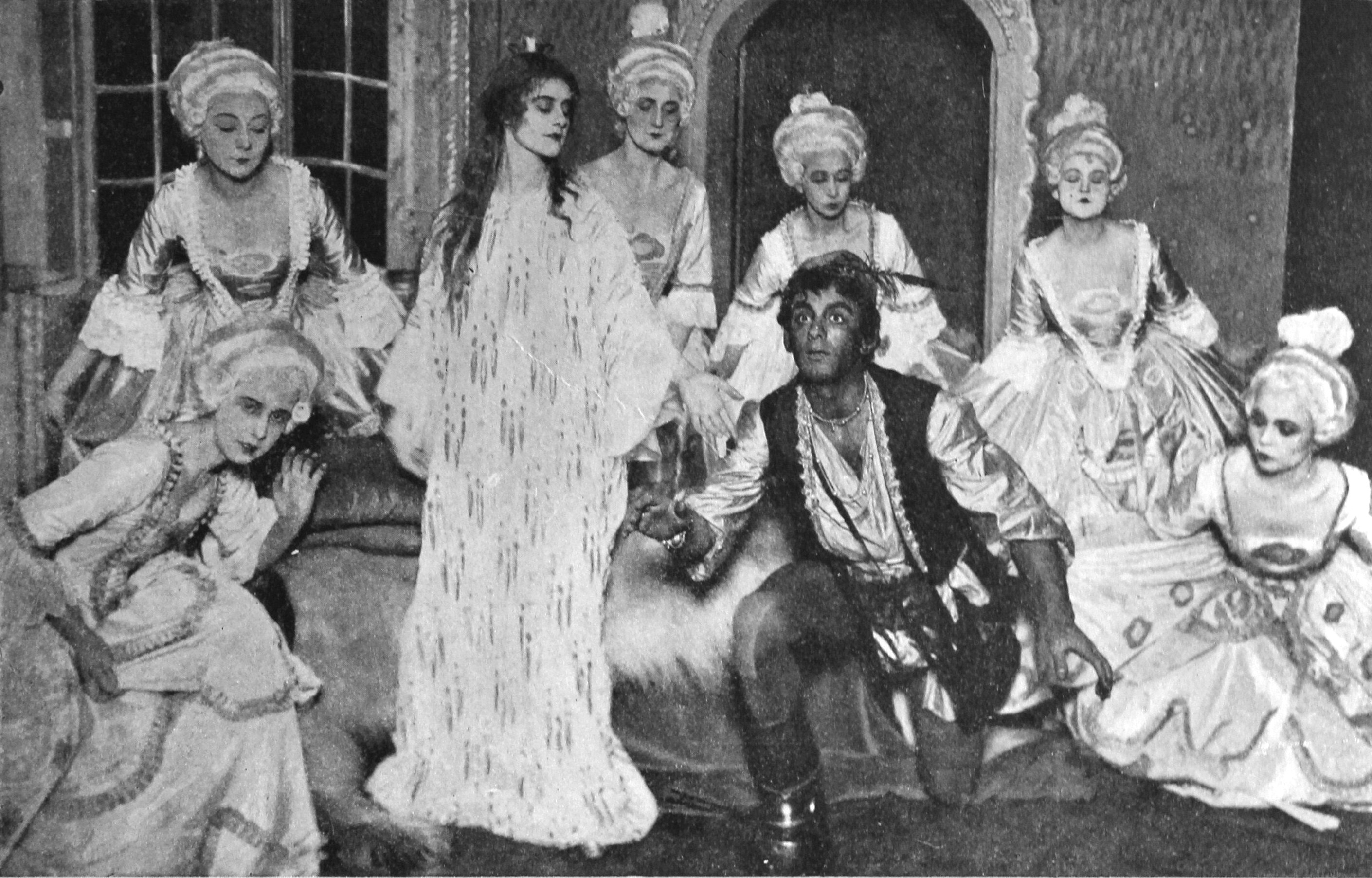 Sagospelet Det var en gång av Holger Drachmann på Lorensbergsteatern i Göteborg. Olga Raphael som prinsessan, Semmy Friedman som prinsen.